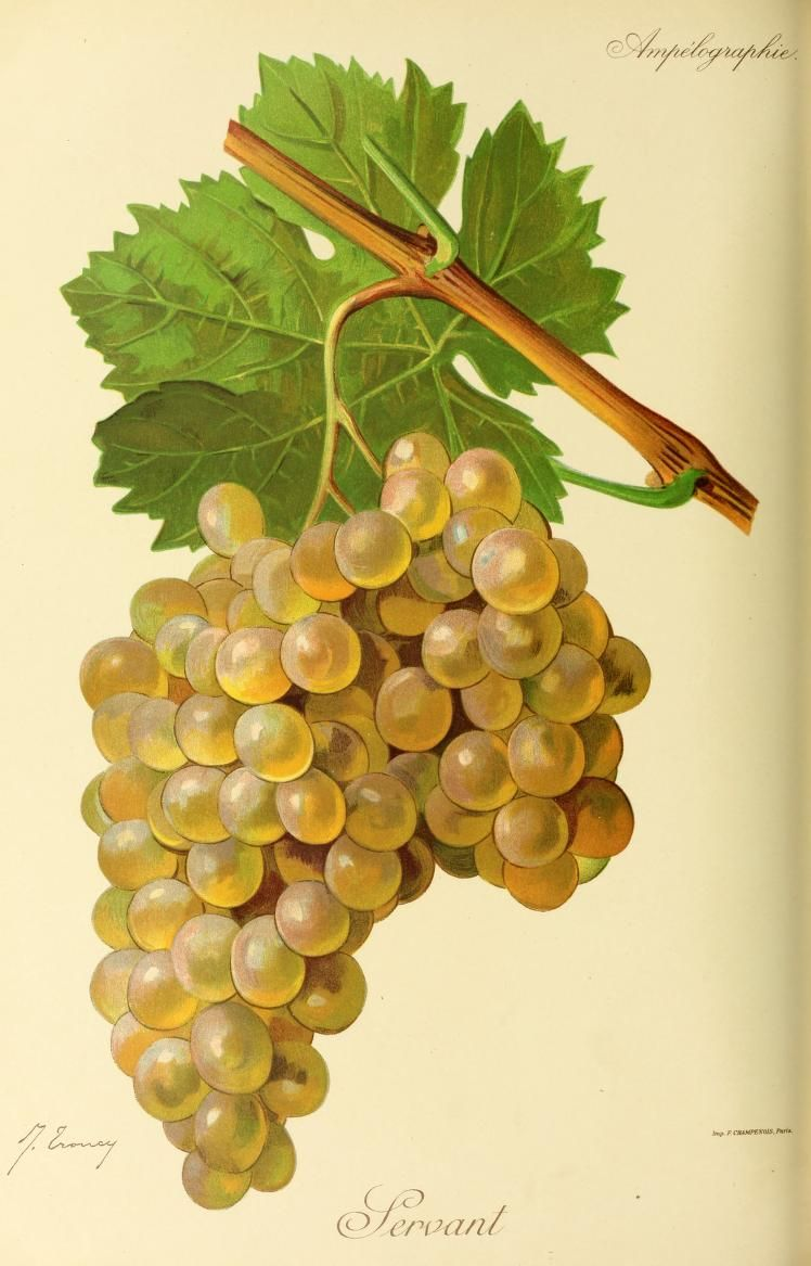 Illustration du cépage Servant par Jules Troncy dans l'ouvrage "Ampélographie : traité général de viticulture" publié sous la direction de P. Viala & V. Vermorel avec la collaboration de A. Bacon, A. Barbier, A. Berget [et al.] - Date de l'édition originale : 1901-1910